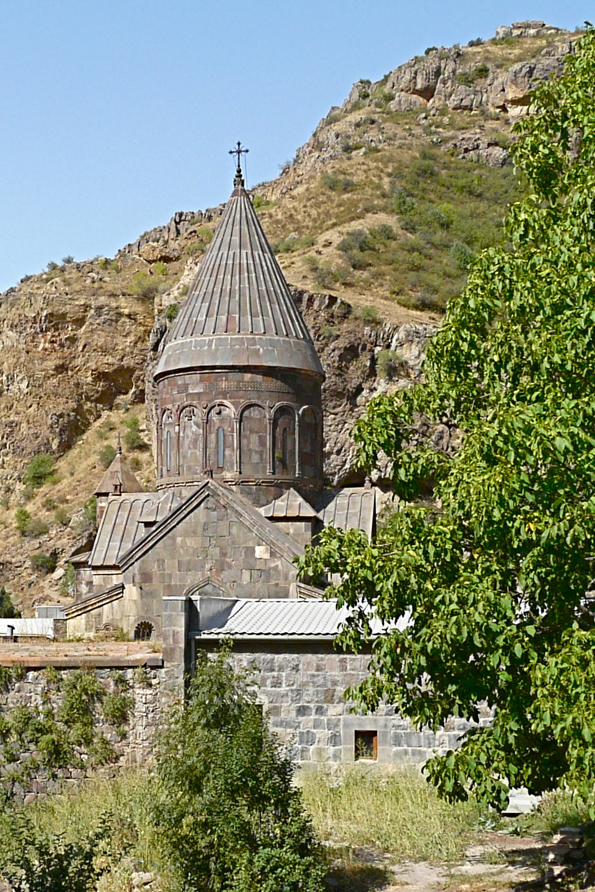 View On Black Holenklooster op het einde van de Aziatschlucht, en in de 8ste en 10de eeuw verwoest door Arabieren. In de 13de eeuw, onder de Zakharjanen, werd de hoofdkerk gebouwd. De Zakharjanen hebben Armenië van de Seldsjoeken gevrijwaard. Daarna werden de holen tot kerken omgevormd. Het kloostercomplex bestaat uit wooncellen voor de monniken, de kerk Moeder Gods, holenkapellen en profane gebouwen. zie ook